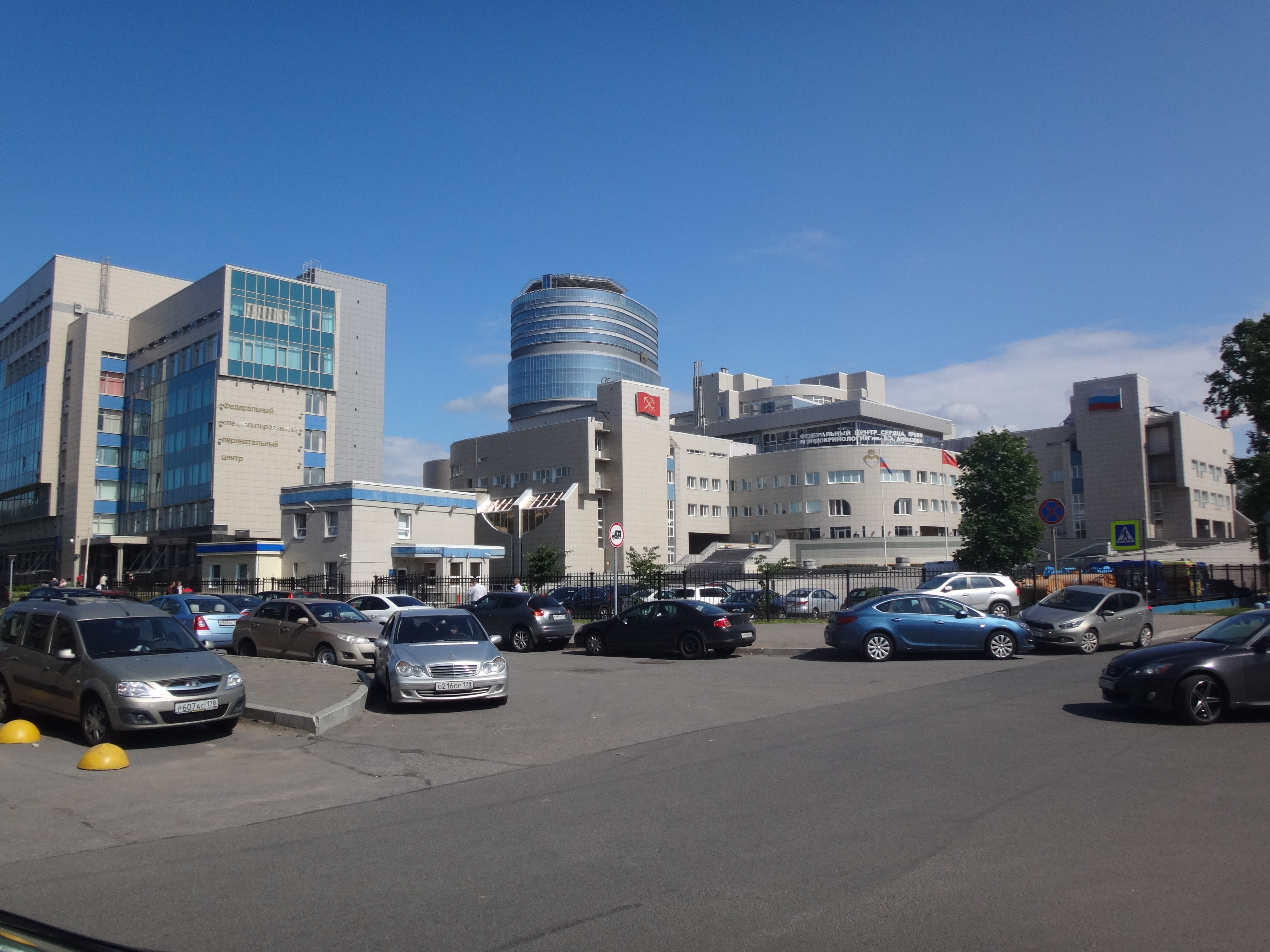 Клиника Алмазова